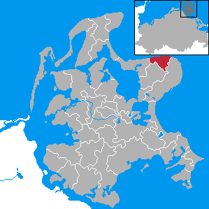 Lohme, Landkreis Rügen, Mecklenburg-Vorpommern